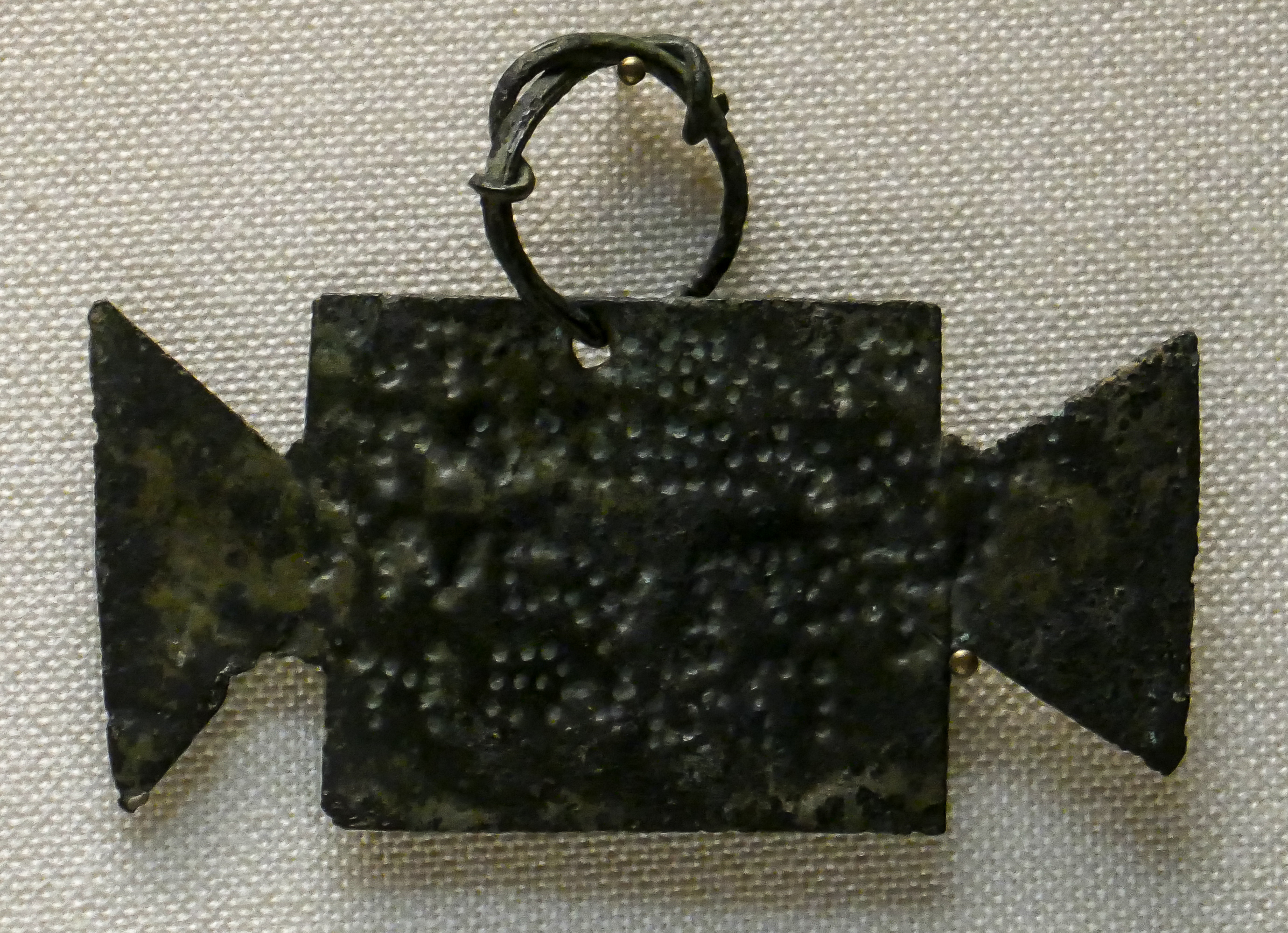 Tabula ansata de cobre con anilla con inscripción votiva a Némesis siglos II-III. Inscripción en tres líneas por puntos incisos. Museo Arqueológico de Sevilla